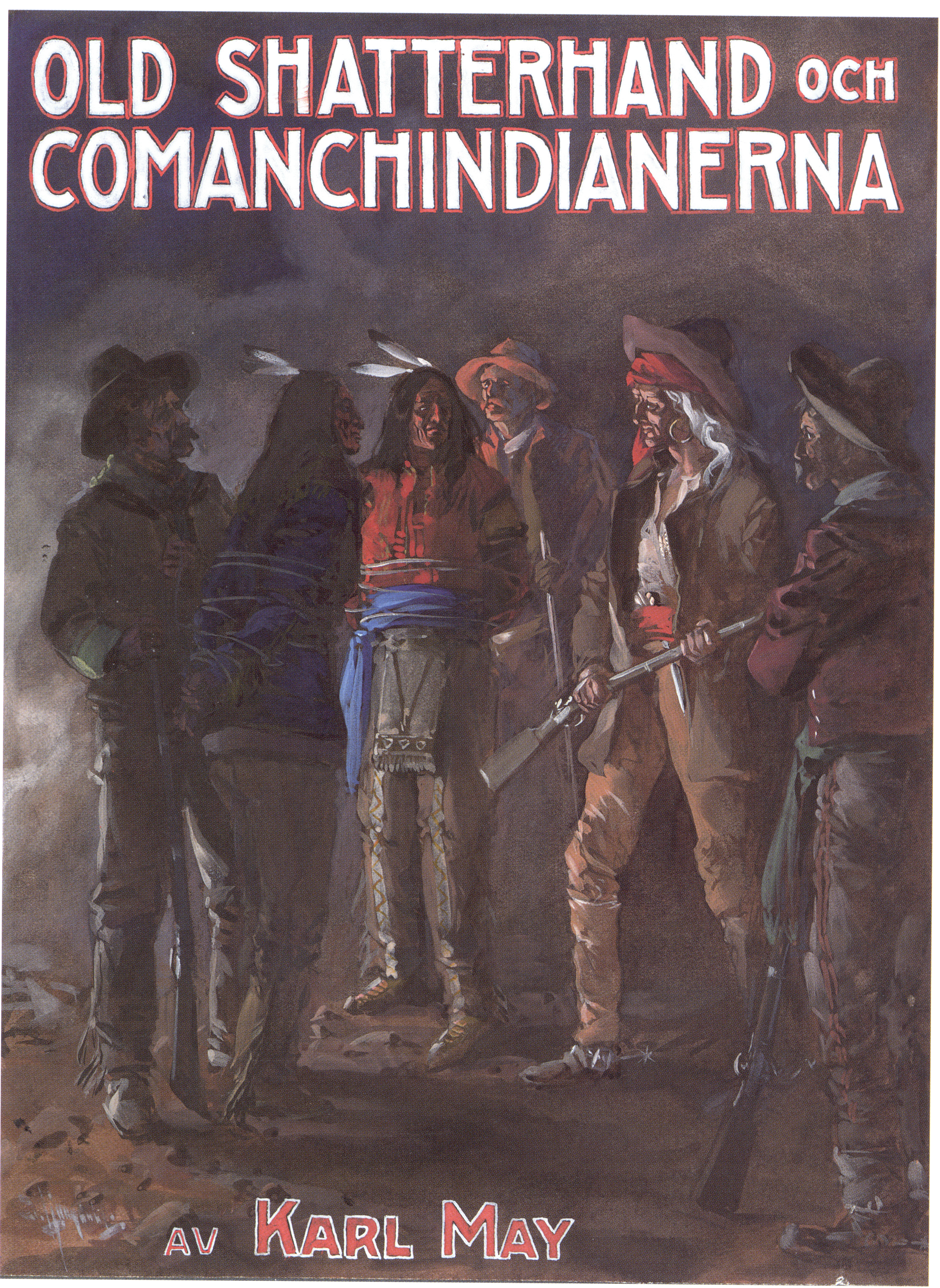 Bokomslag till Karl May - Old Shatterhand och comanchindianerna Artist: David Ljungdahl (1870-1940)